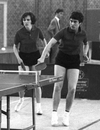 Endspiel in der Bresthalle in der Lantziusstraße. Die Kielerinnen Edit Buchholz (hinten rechts) und Ingrid Bahnert-Kriegelstein (hinten links) unterliegen dem Doppel Simon und Gröber vom DTC Kaiserberg (vorne) mit 0:2.